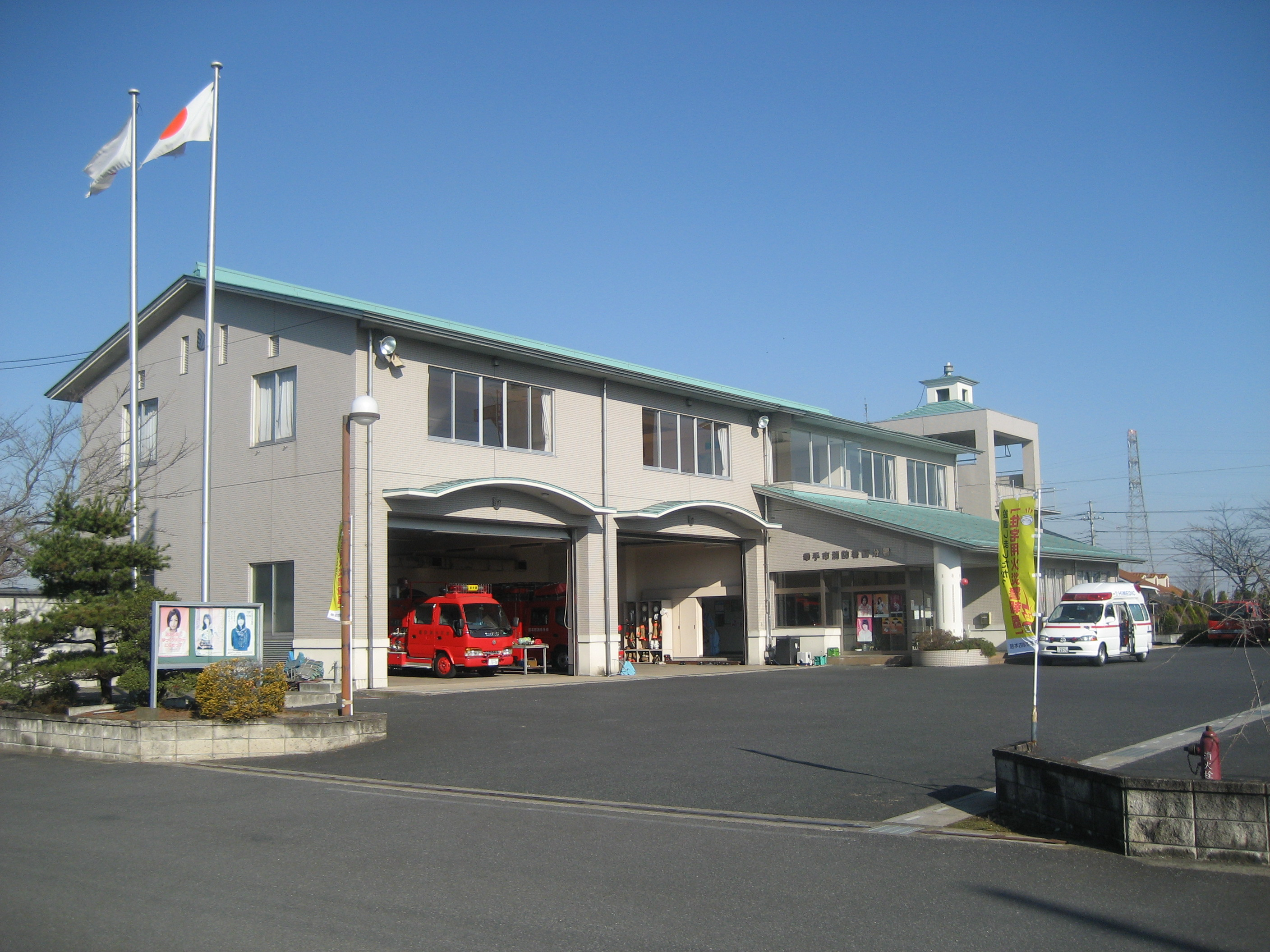 幸手市消防本部西分署